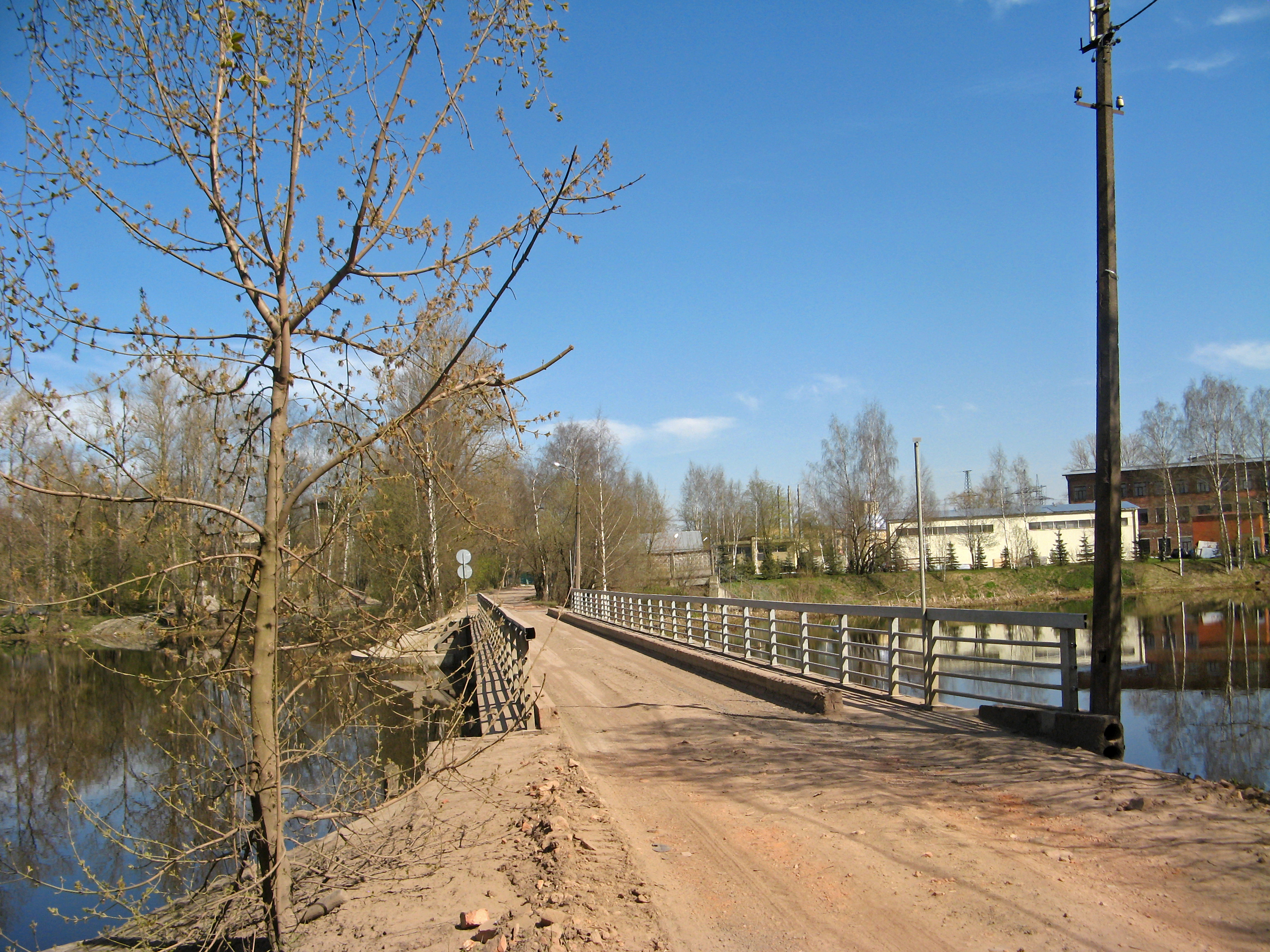 Капсюльный мост, Санкт-Петербург